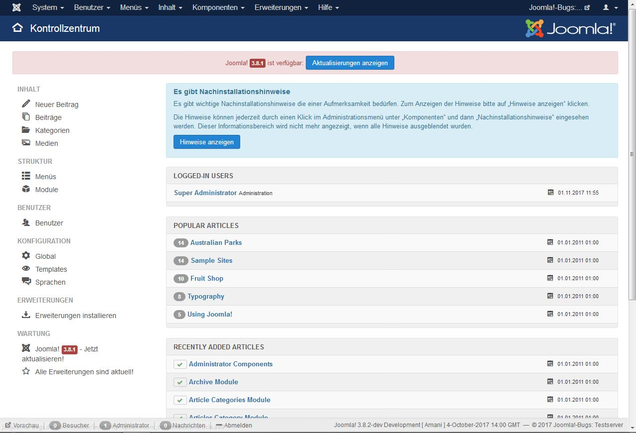 Joomla! 3.8.1 Backend Ansicht